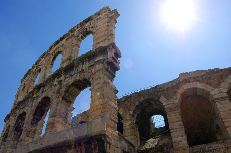 L'ala dell'Arena di Verona